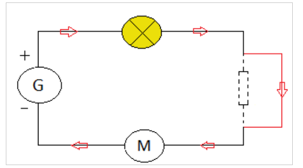 Circuit électrique en série - Court circuit